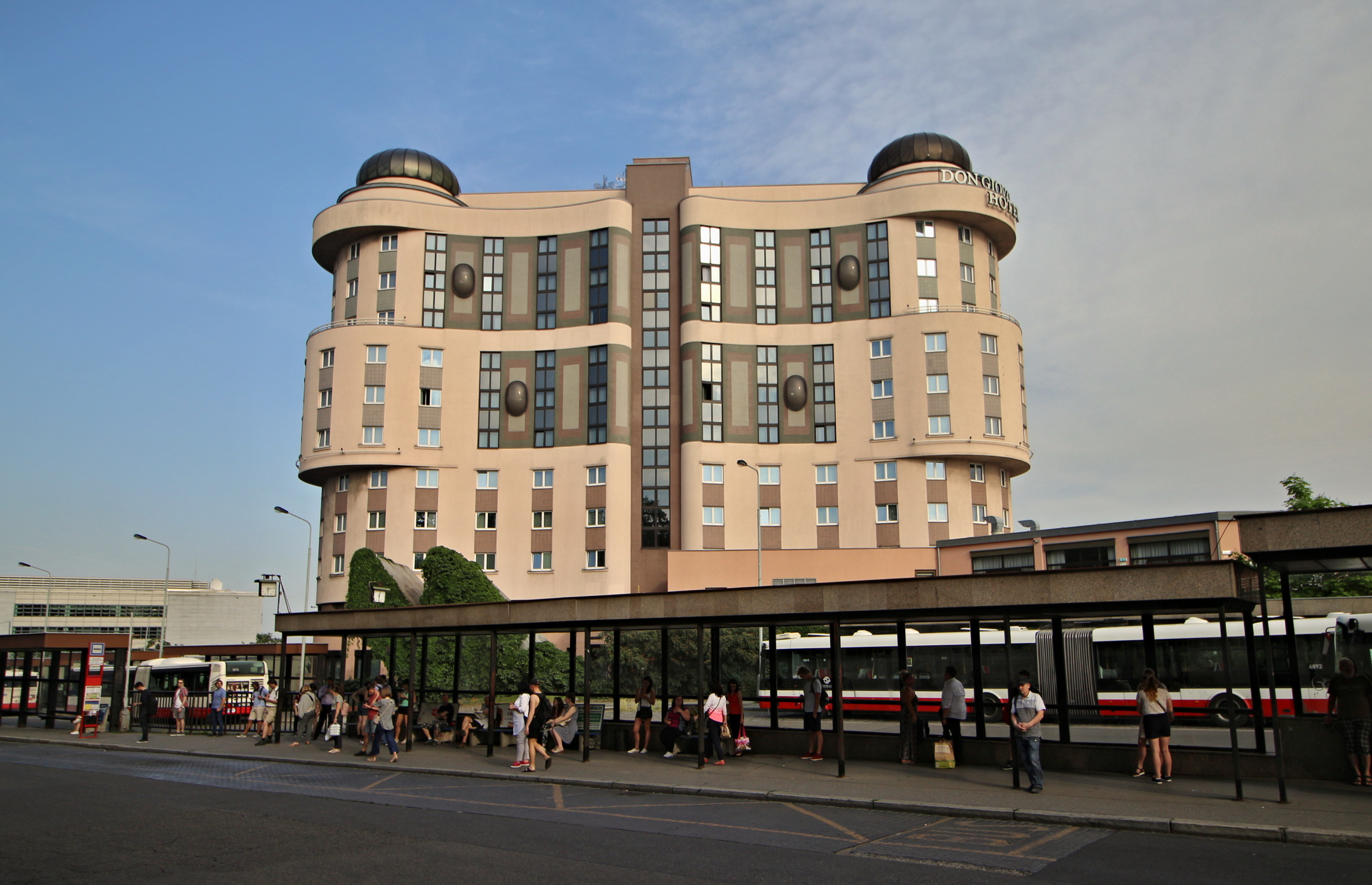 Praha, Želivského, hotel Don Giovanni a metro